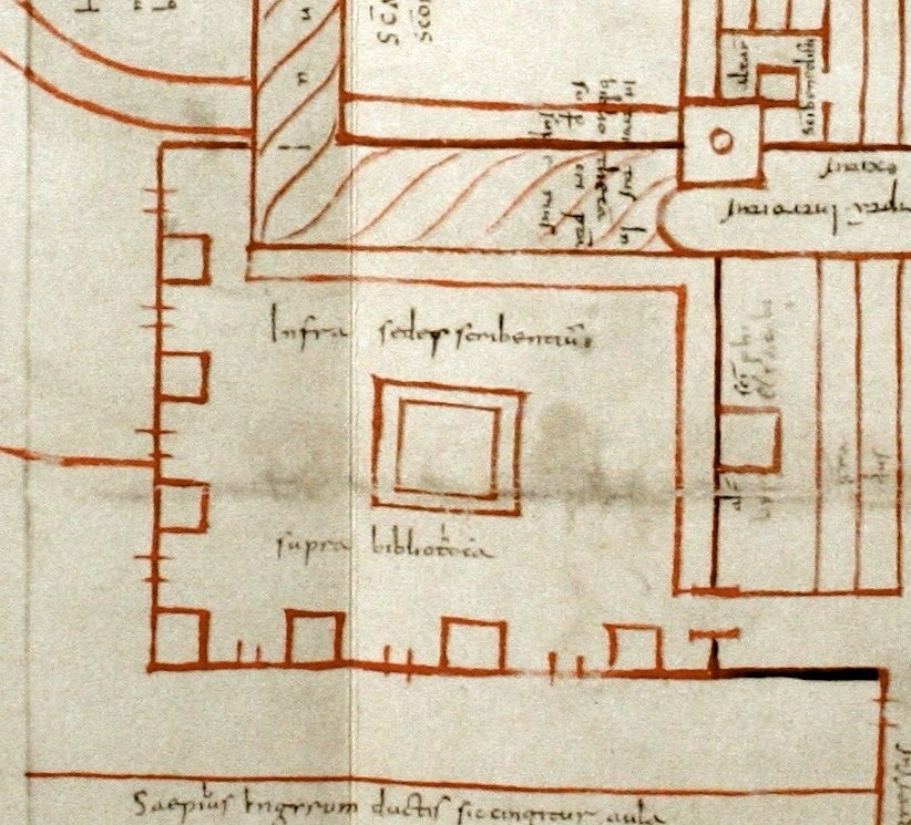 St. Galler Klosterplan, 9. Jh. (Detail)